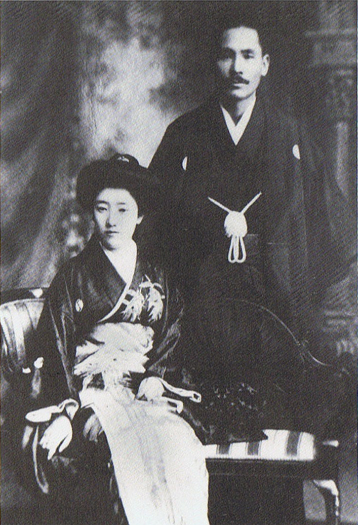 伊藤傳右衛門と柳原燁子（柳原白蓮）の結婚写真。明治44年（1911年）3月